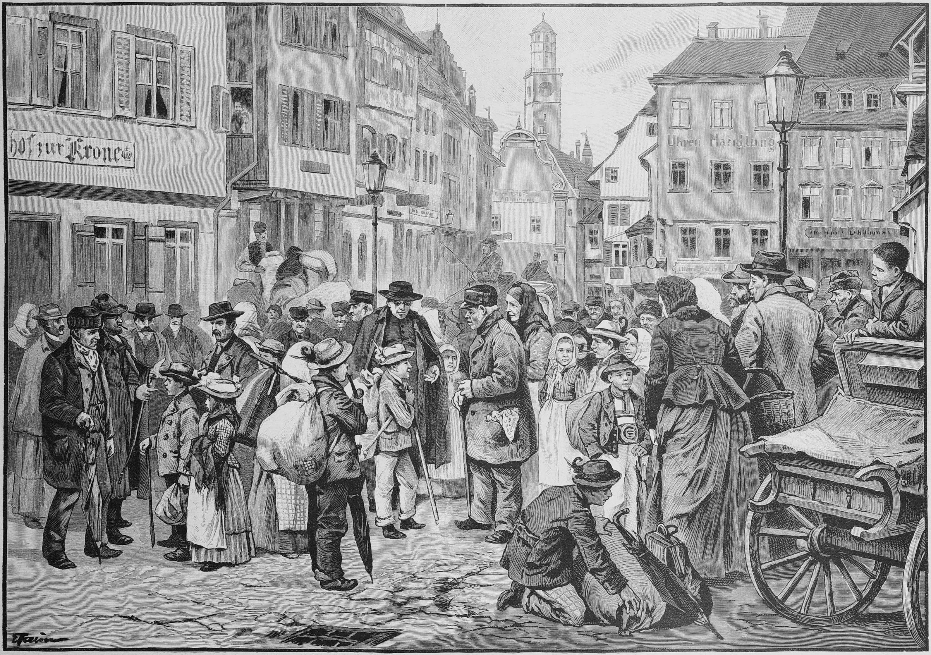 Das Vermieten der tiroler „Schwabenkinder“ in Ravensburg. Nach dem Leben gezeichnet von E. Klein.